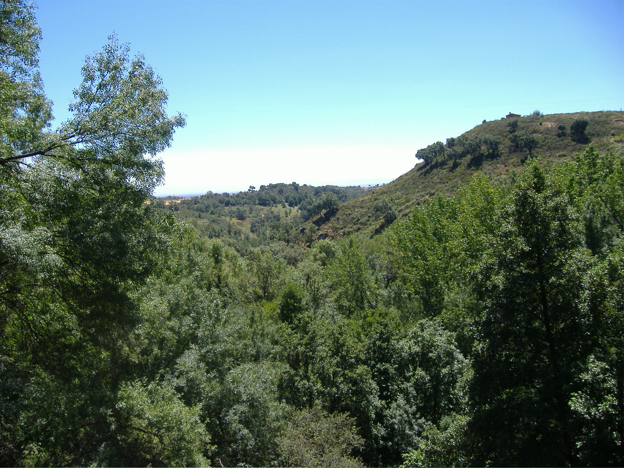 Paisaje de la Vera